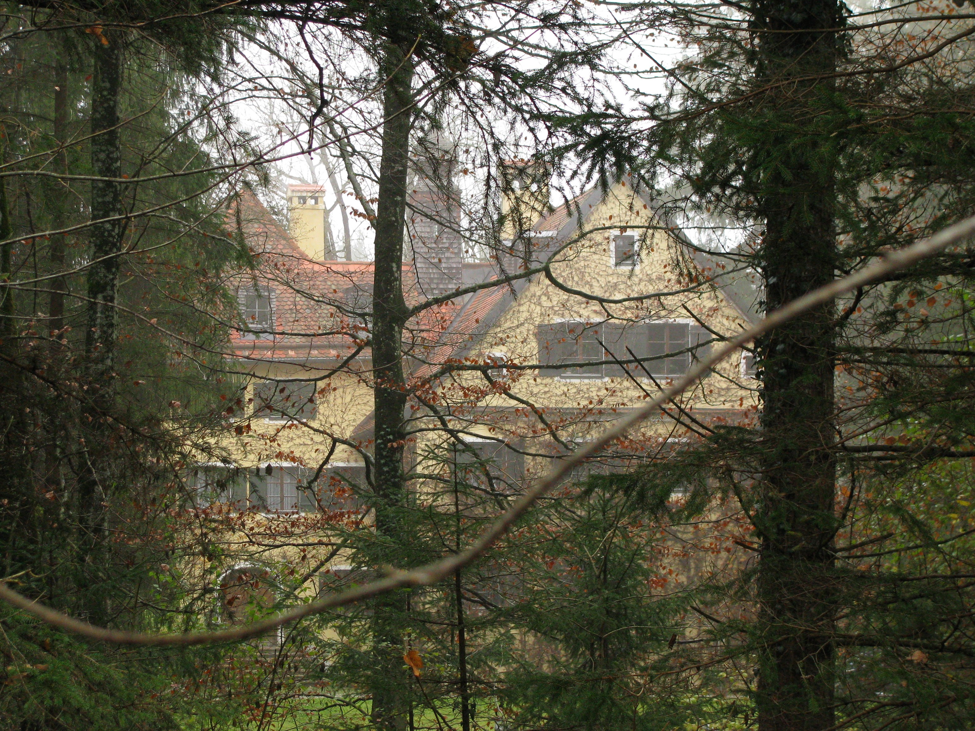 Schloss Ascholding; vom Gebäude ist von außerhalb des umzäunten Grundstücks nur wenig zu erkennen.